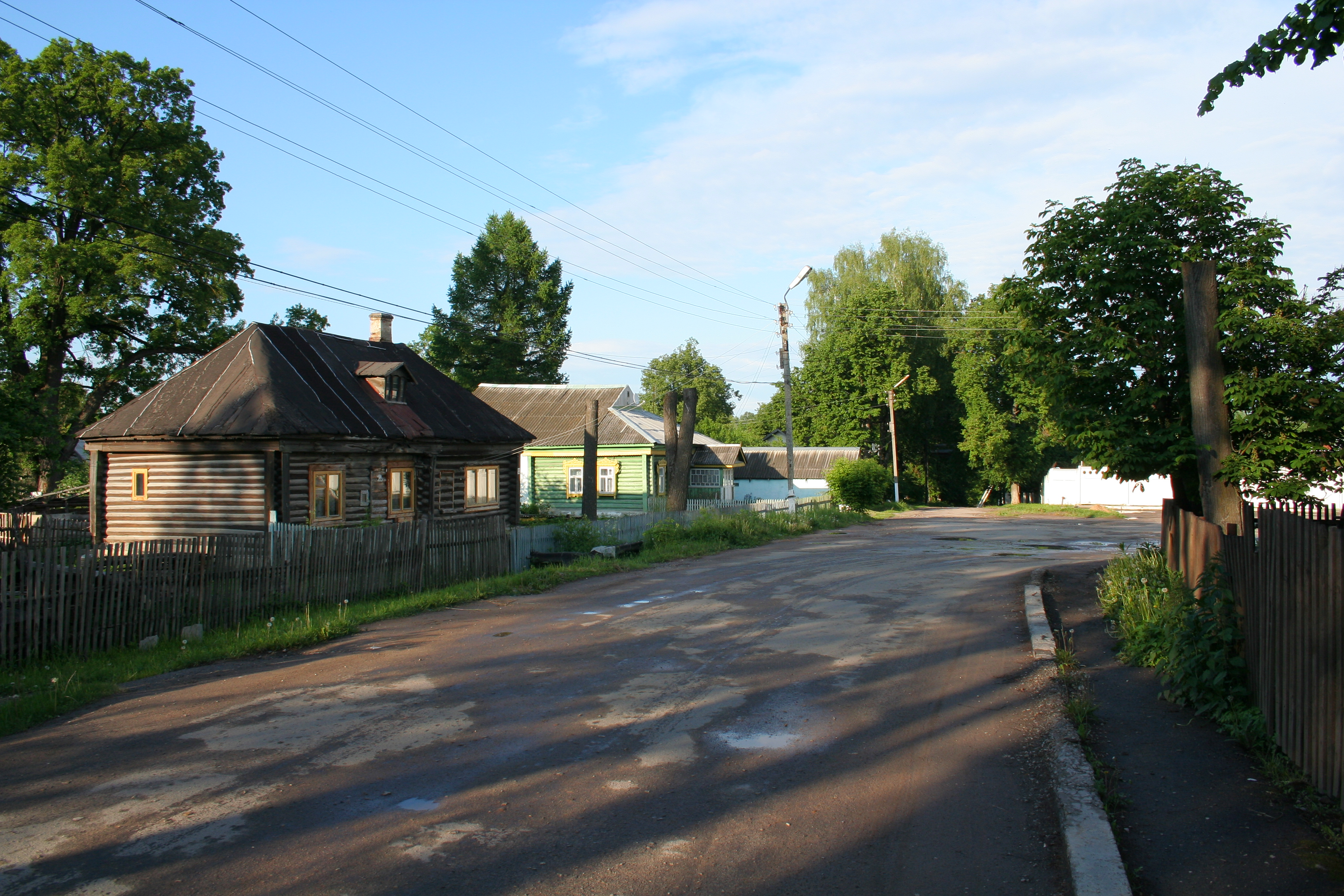 Stadt Kondrowo, Oblast Kaluga, Russland. Holzhäuser.